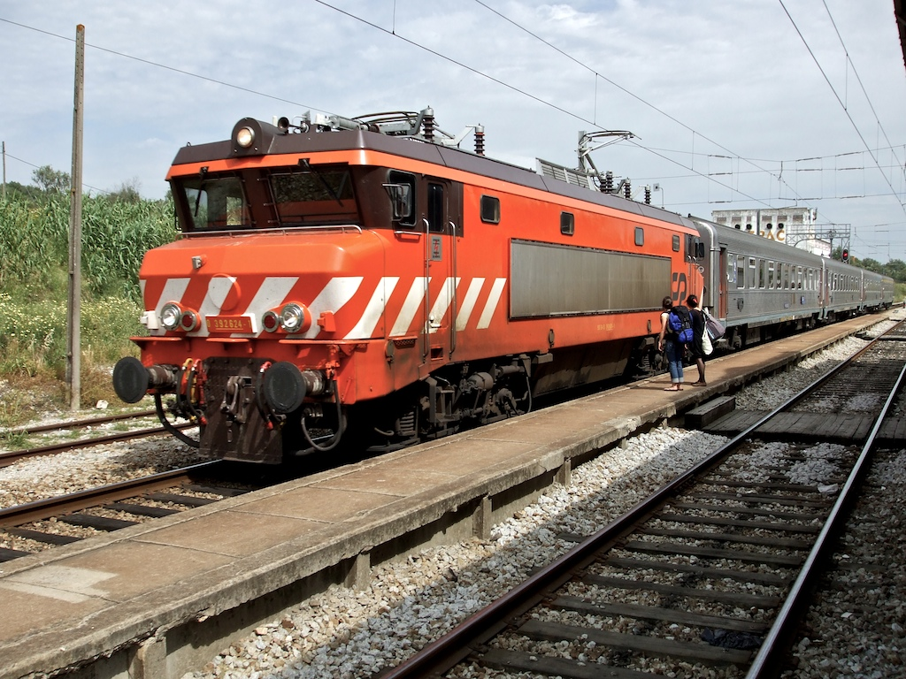 Tipo: Comboio Intercidades 672 [Faro - Lisboa • Oriente] Local: Estação de Alcácer do Sal [Linha do Sul, PK 78] Data e hora: 3 de Maio de 2008 [15h43] Material: Locomotiva 2624 + 4 carruagens Sorefame Renovadas